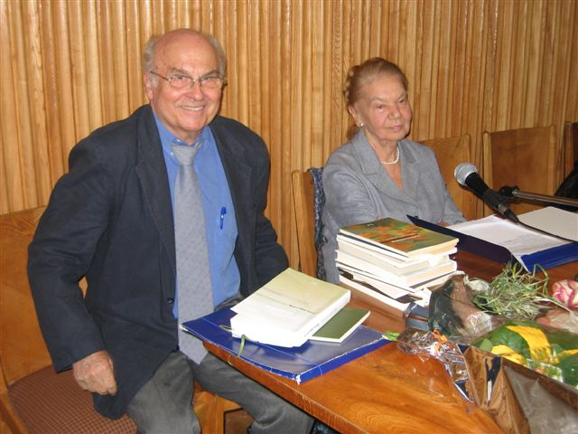 Ryszard Kapuściński (1932-2007), Polish writer and journalist and Julia Hartwig (1921-2017), Polish poet